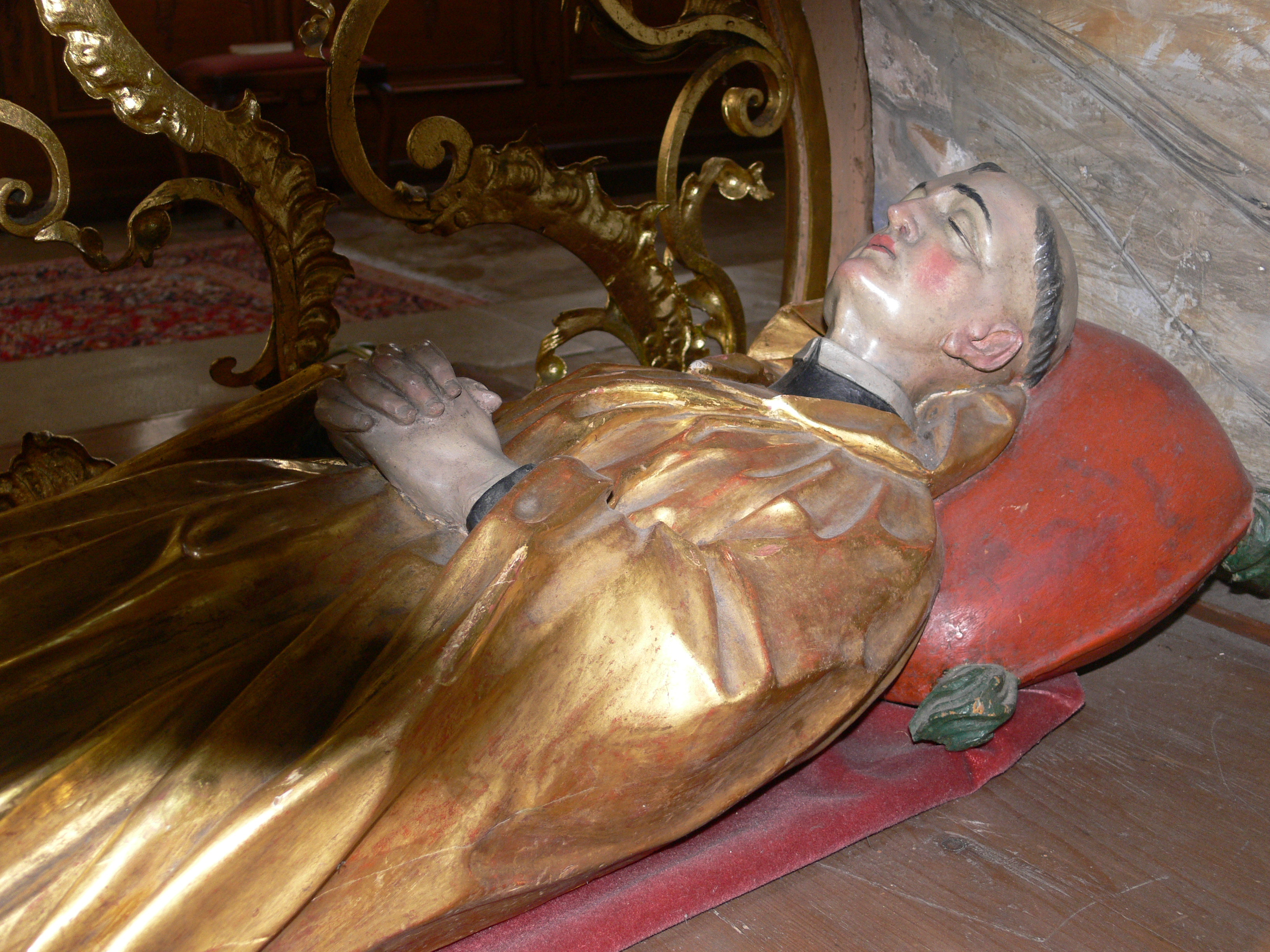 Pfarrkirche St. Ulrich, St. Ulrich im Schwarzwald, Gemeinde Bollschweil Kreuzaltar von Matthias Faller mit Grab des Hl. Ulrich von Zell, Detail: Figur des Ulrich von Zell von Matthias Faller